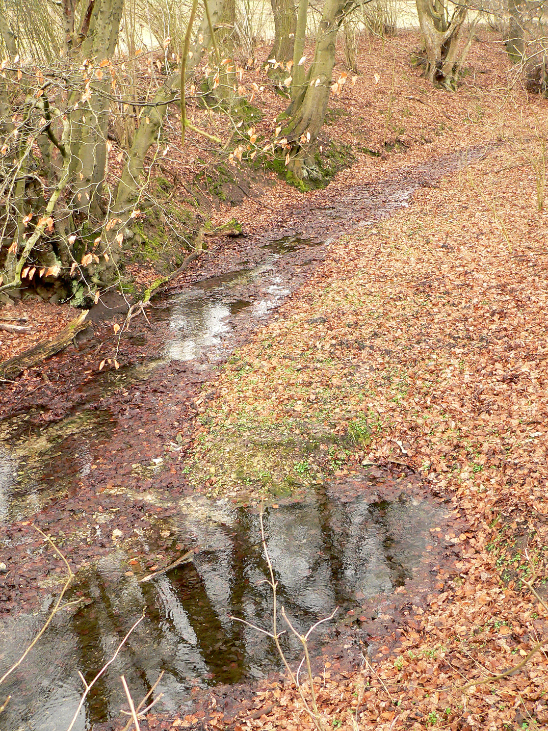 Schunterquelle im Elm oberhalb von Räbke